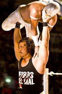 Héctor Garza luchando contra Místico.